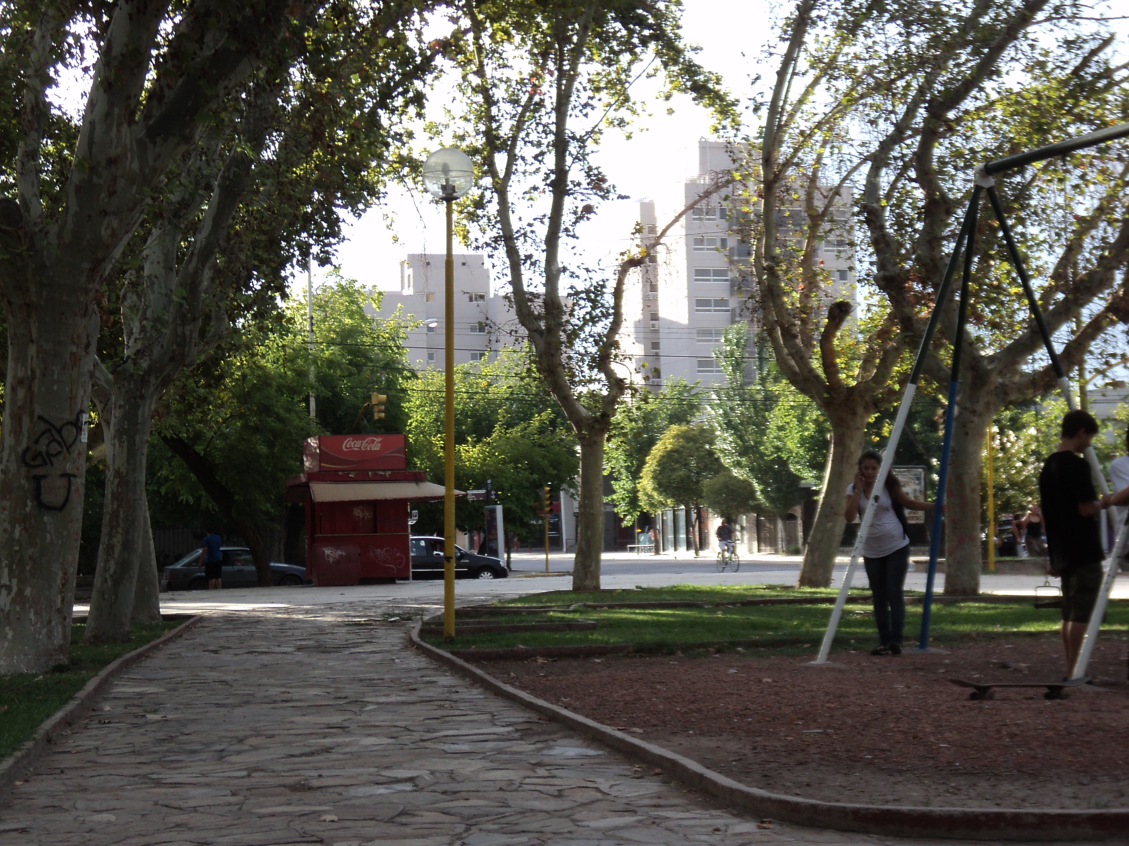 juegos y torres de altura ne la plaza Laprida